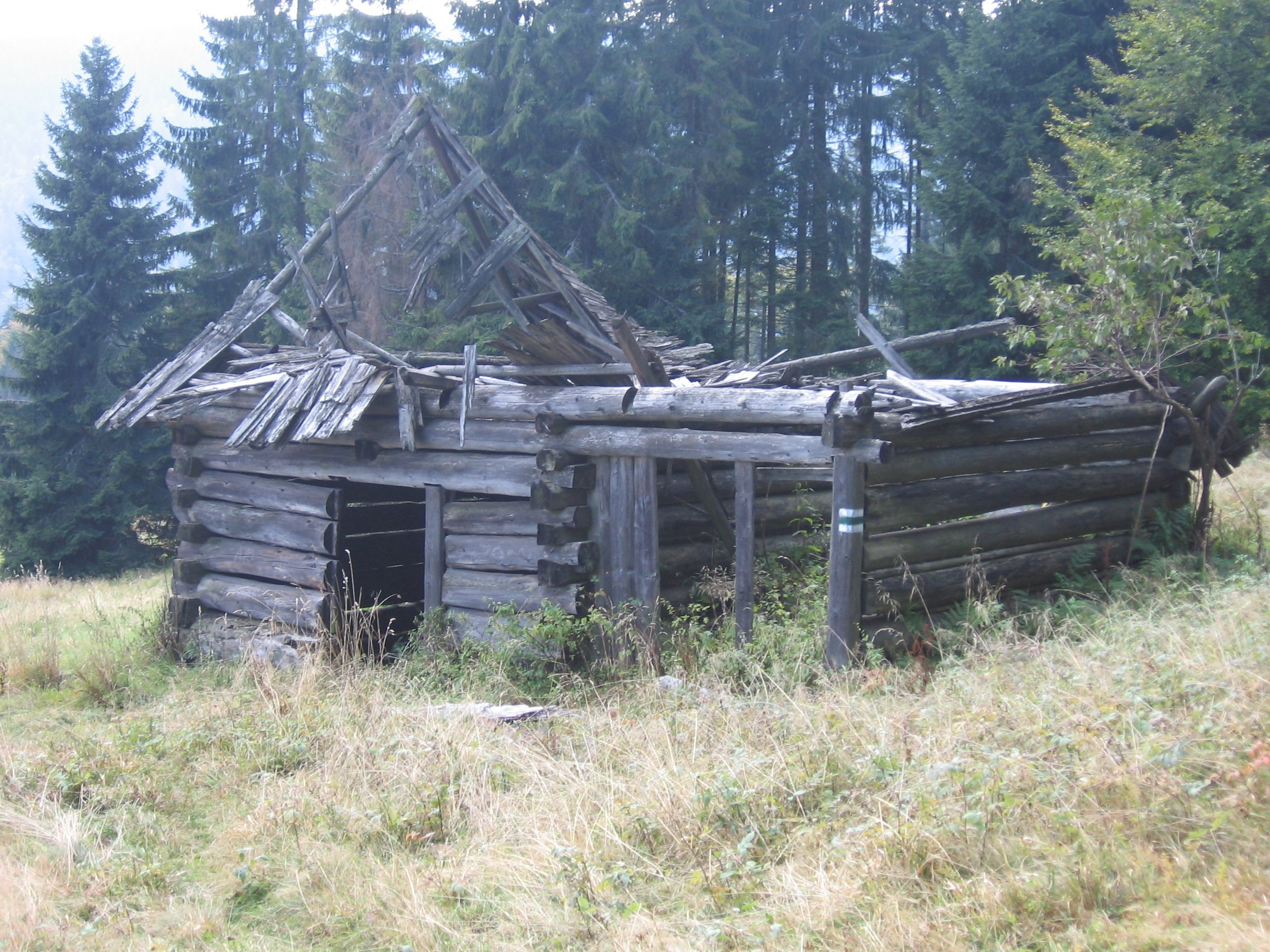 Ruiny bacówki na polanie Stawieniec